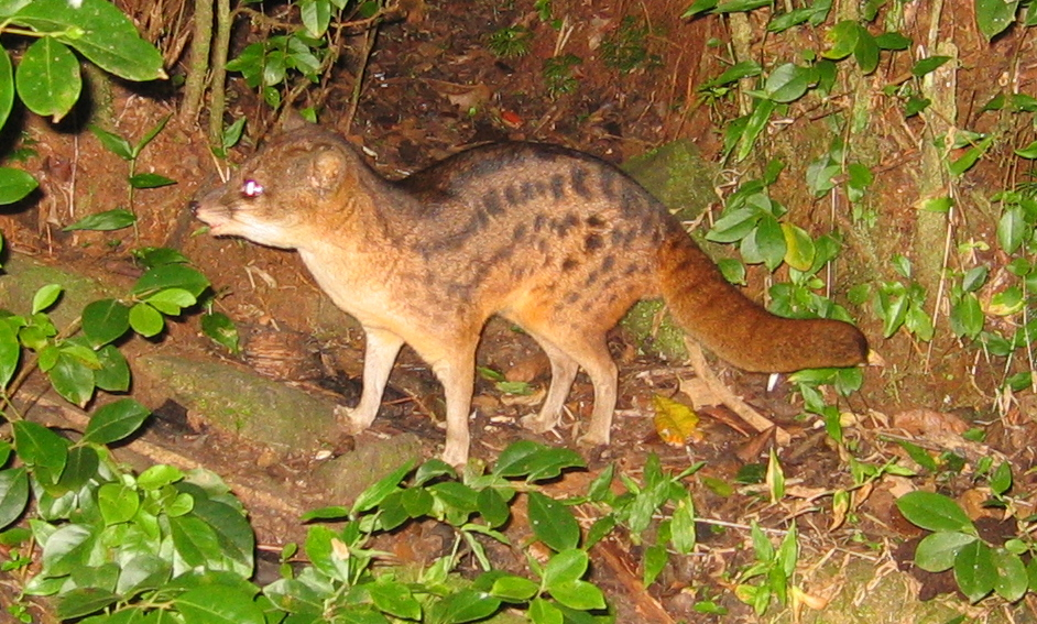 fanaloka o civeta de Madagascar, dando un paseo por Ranomafana NP, que se acercó bastante a nosotros.